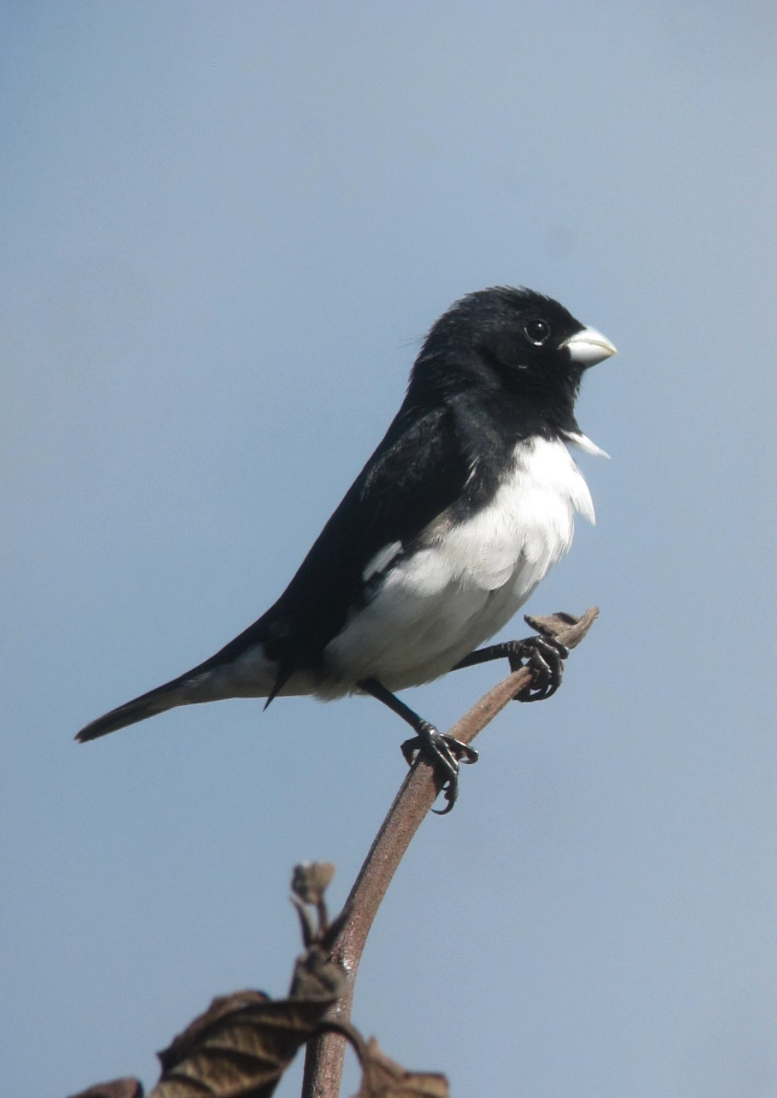 La Unión, Antioquia, Colombia